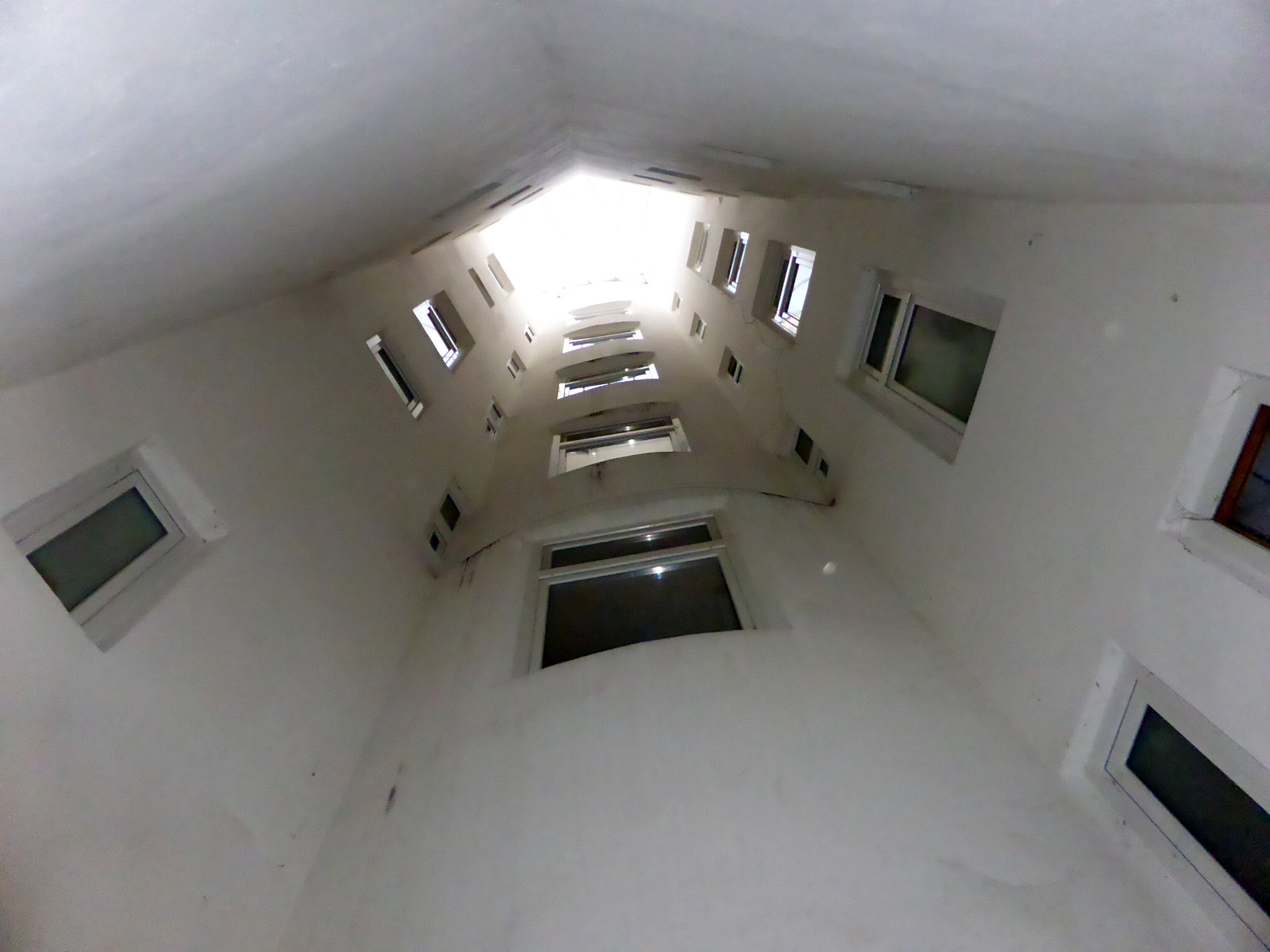 Wikipedia:Kontor Hamburg, der Lichthof.